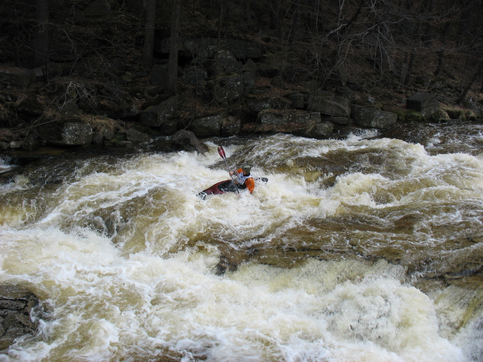 Mistrzostwa w Kajakarstwie Górskim AMP Kamienna 2006 - odcinek finałowy